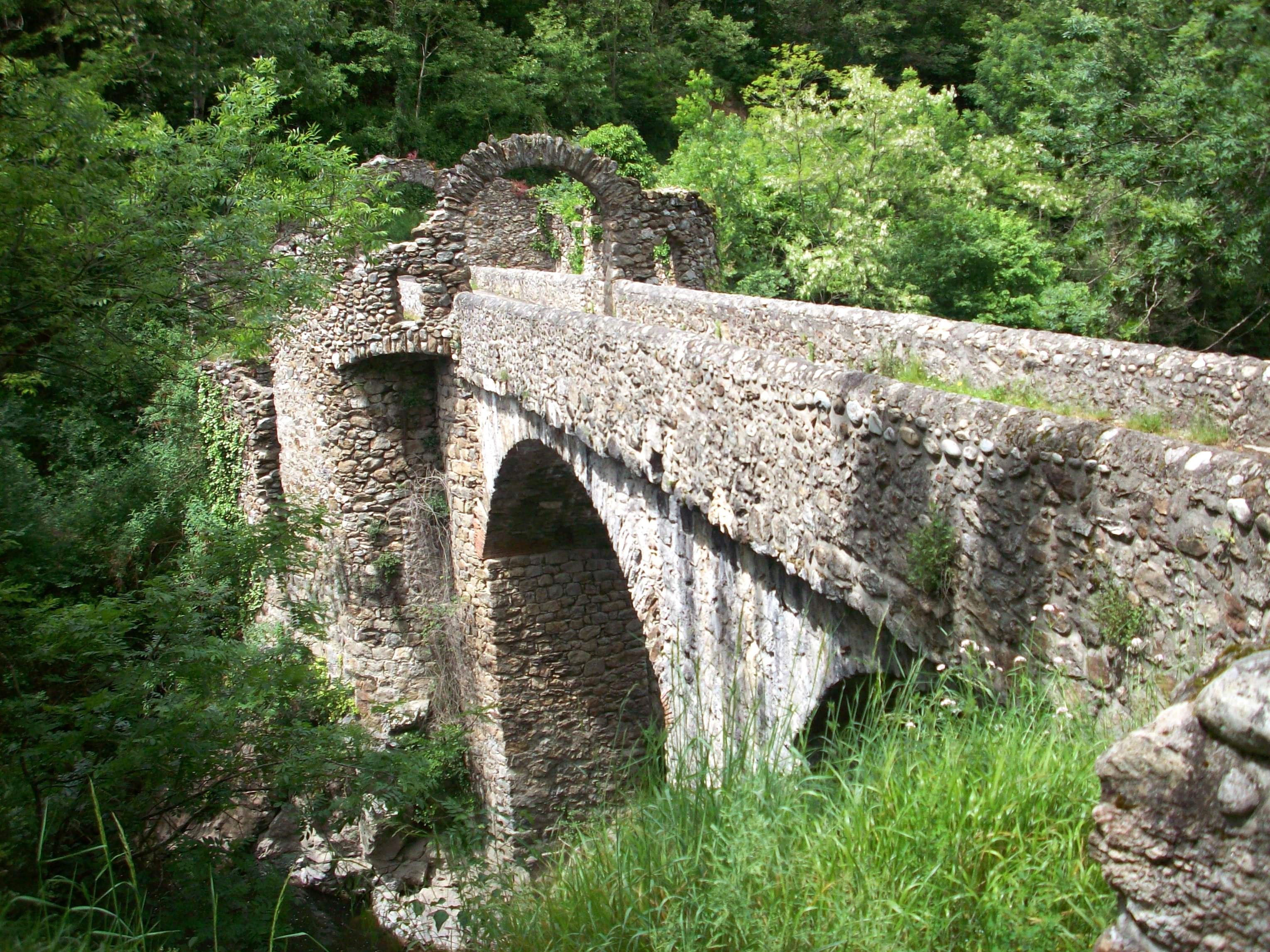 Pont du Diable de Montoulieu (Ariège, France).